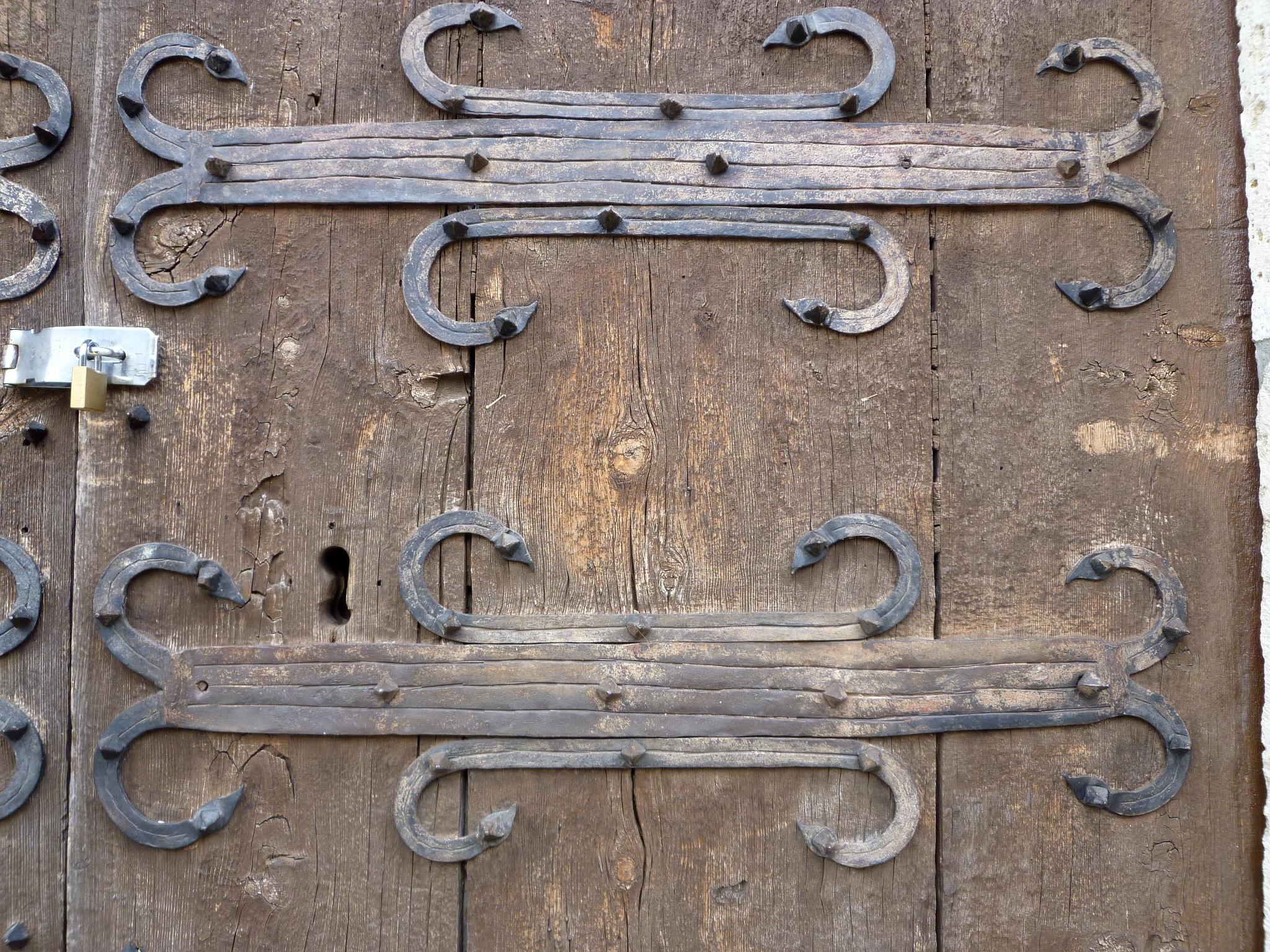 Església de Sant Quirze i Santa Julita (la Coma i la Pedra): detall de la porta